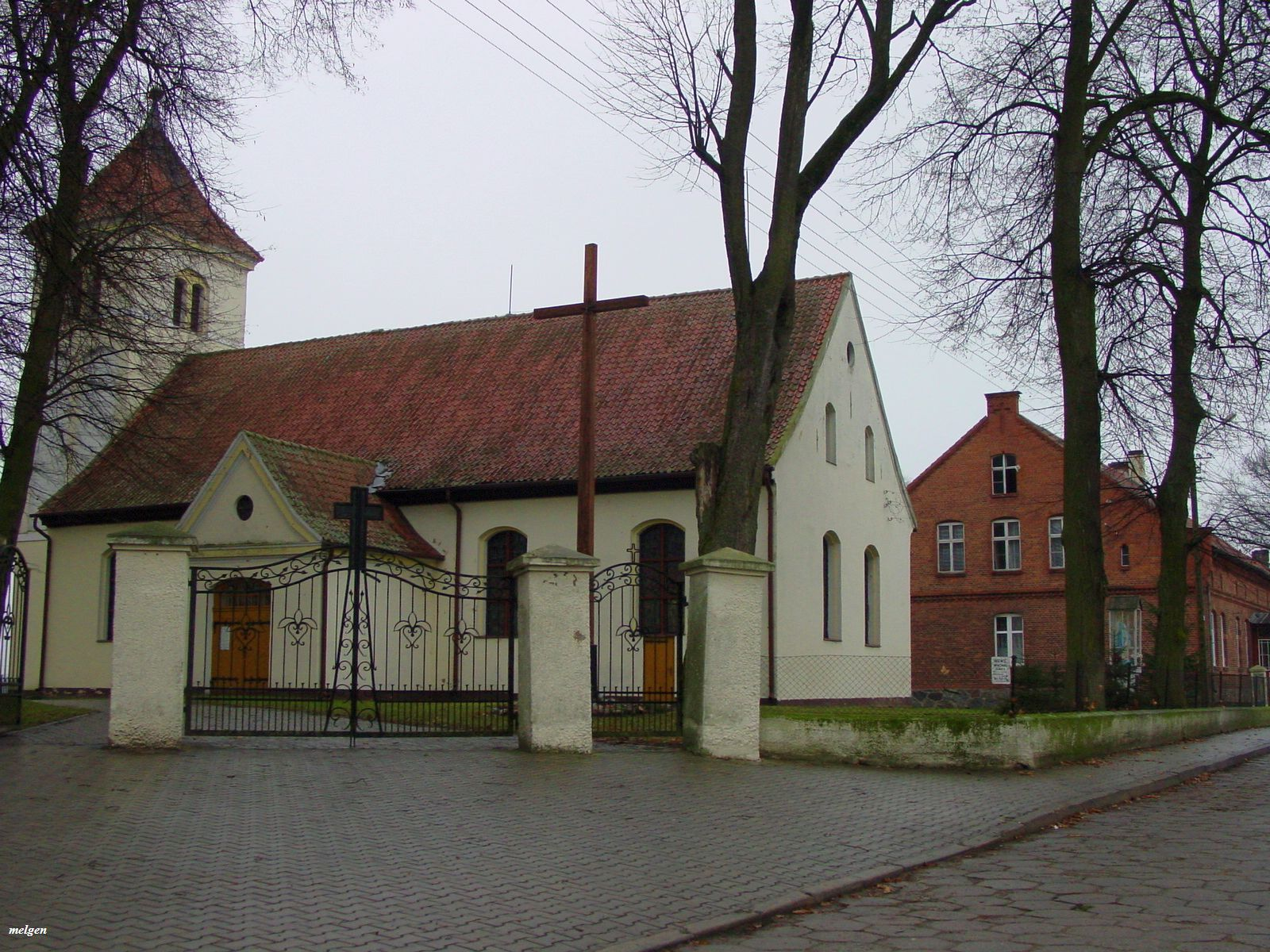 Budry, kościół parafialny p.w. Świętej Trójcy (zabytek nr rejestr. 20)